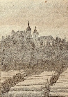 Castelul Urmanczy şi capela acestuia